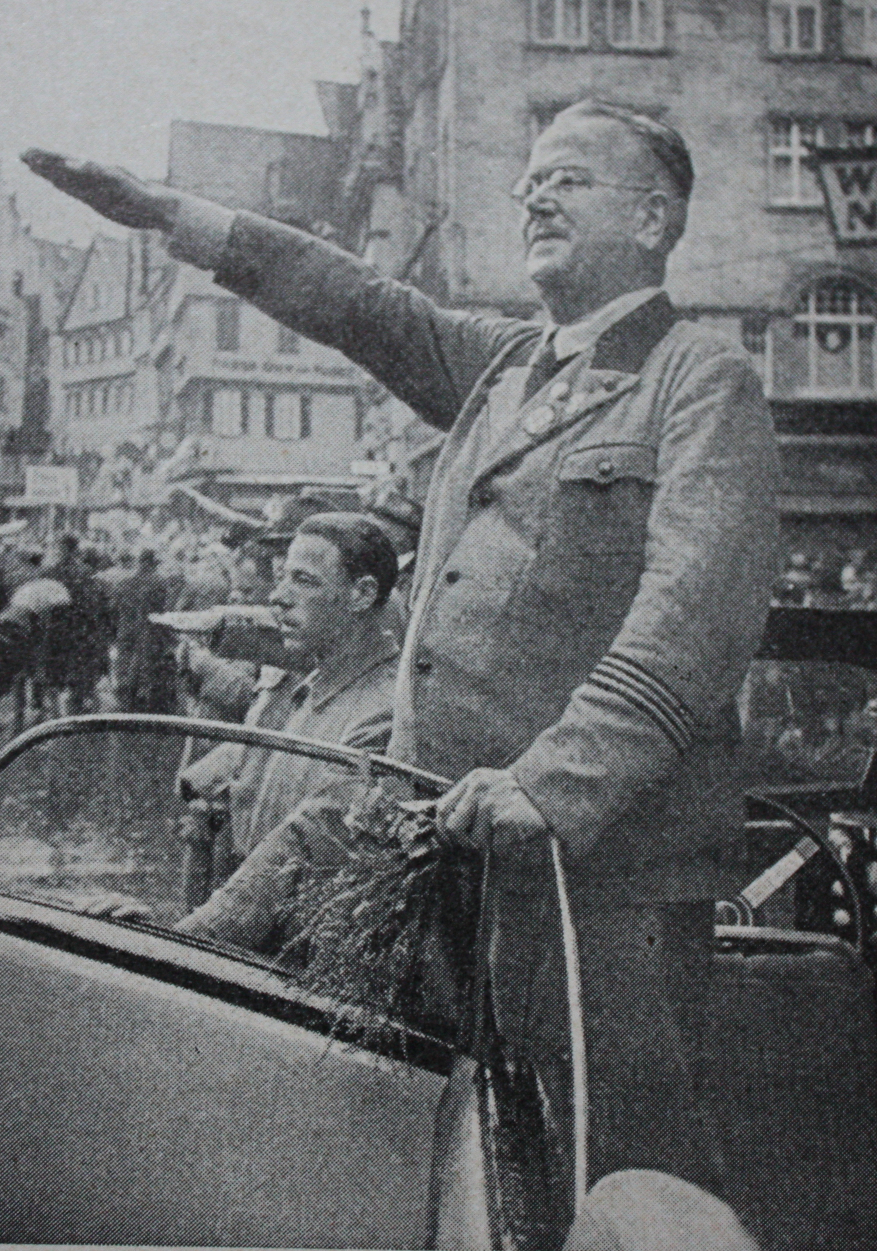 Ferdinand Werner, (1876-1961). Politiker der NSDAP, 1933 Staatspräsident von Hessen, "Reichswanderführer". Aufnahme beim Umzug während des 47. deutschen Wandertages auf dem Stuttgarter Marktplatz am 21. August 1938 Originalbildunterschrift: "Der deutsche Wanderführer nimmt den Vorbeimarsch der 12000 Wanderer ab"